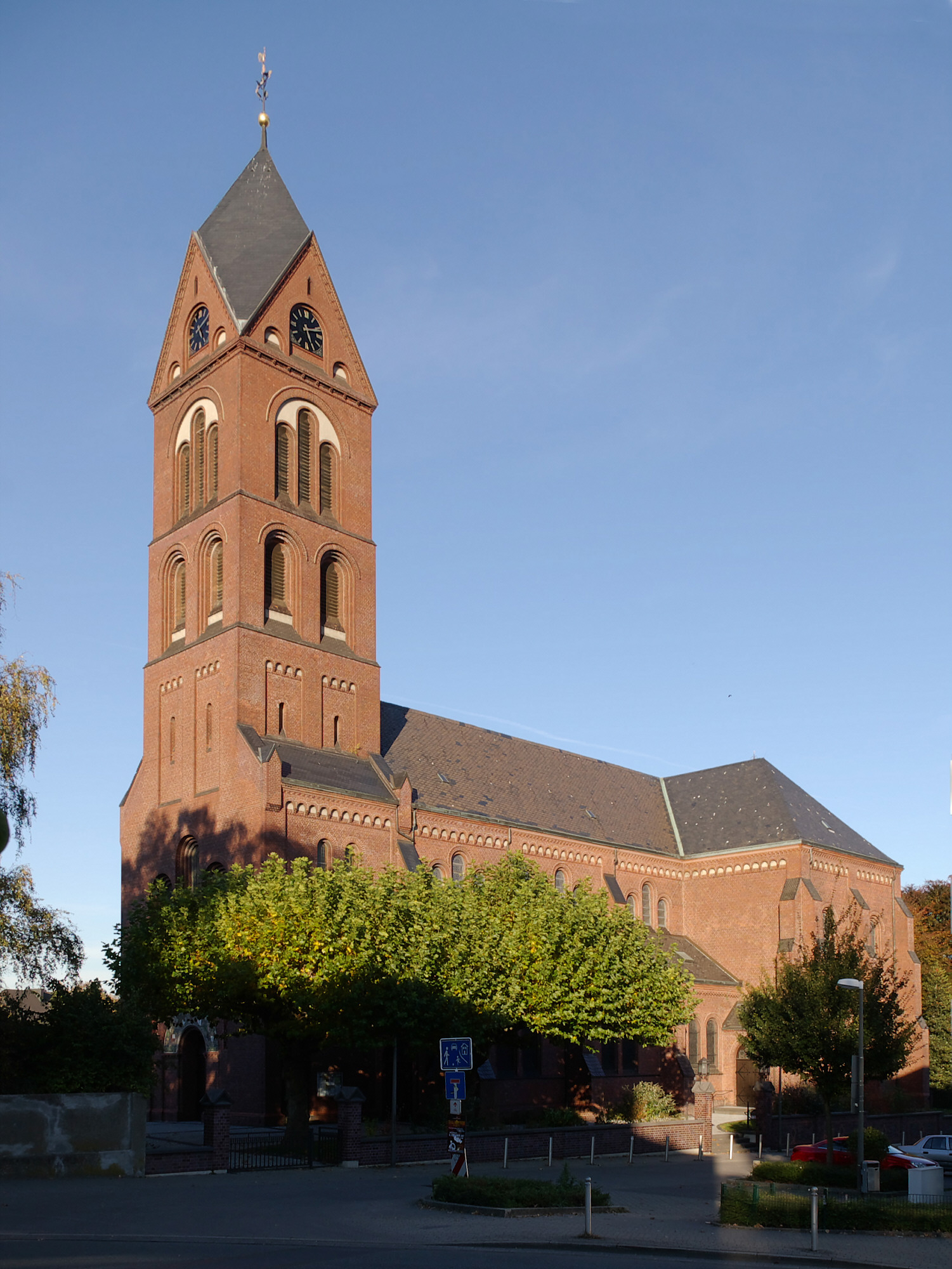 St. Magdalena in Lütgendortmund, Dortmund, Germany. Südwestseite.